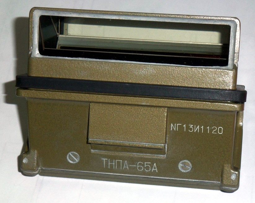 ТНПА-65А производства ИПЗ